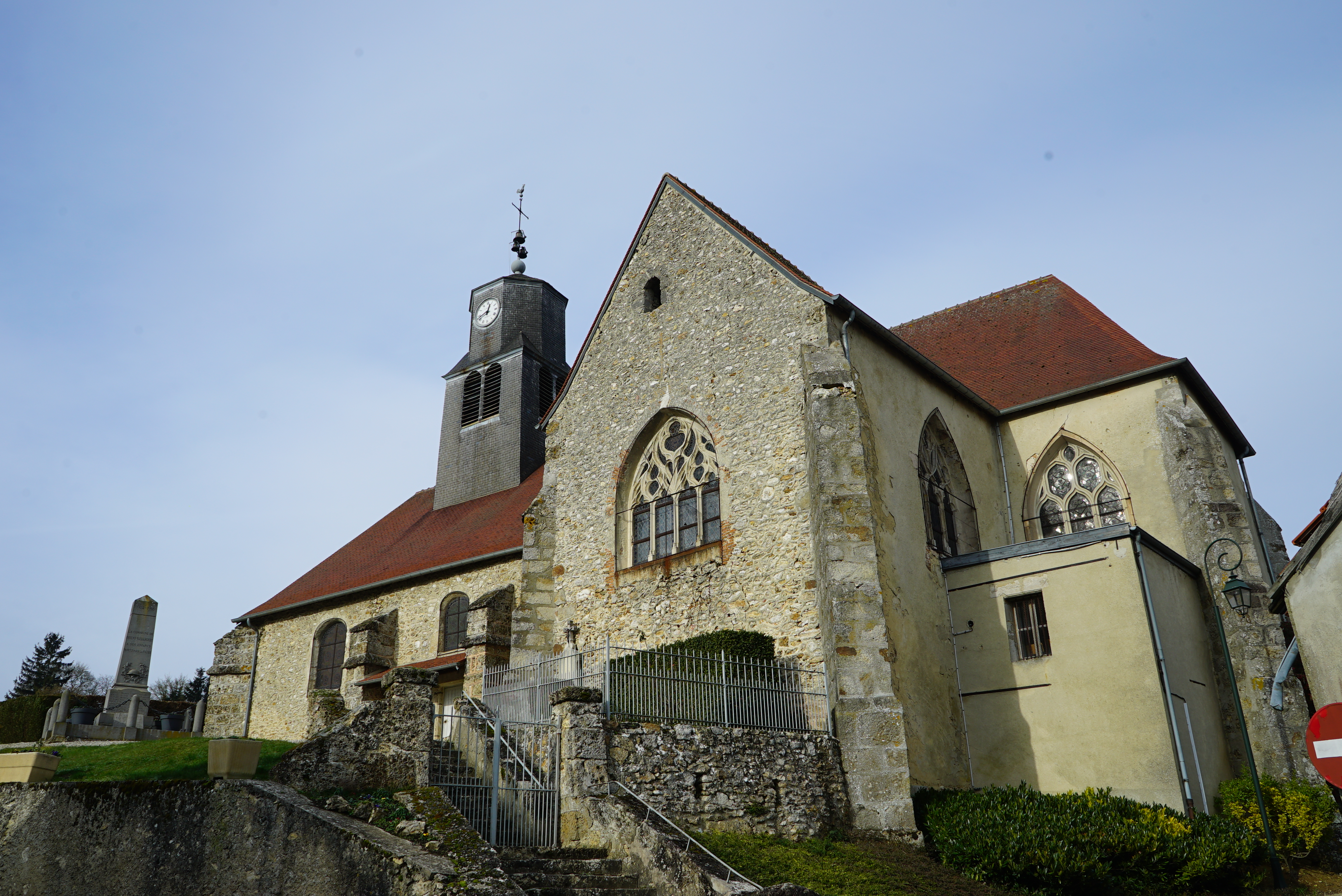 vue du Transept sud en l'église de Brugny